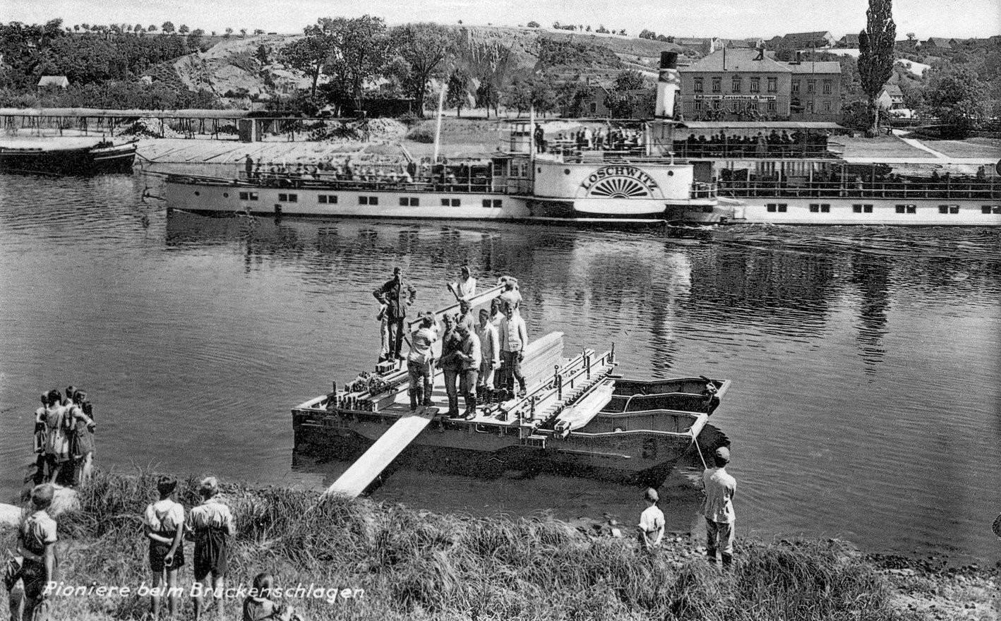 Kleinzadel; Pioniere beim Brückenschlagen, Dampfer Loschwitz This postcard is from publisher Brück & Sohn in Meißen ( postcard has a unique number 26608 and is available in a higher resolution at the publisher. This images was uploaded in a cooperation project between Wikipedians and the publisher.